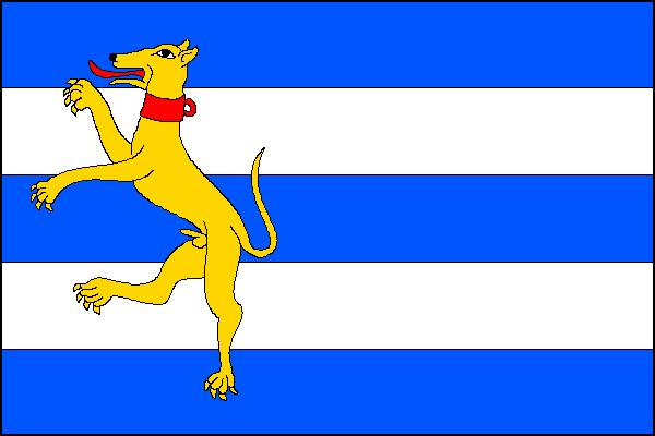 Vlajka obce Křečovice